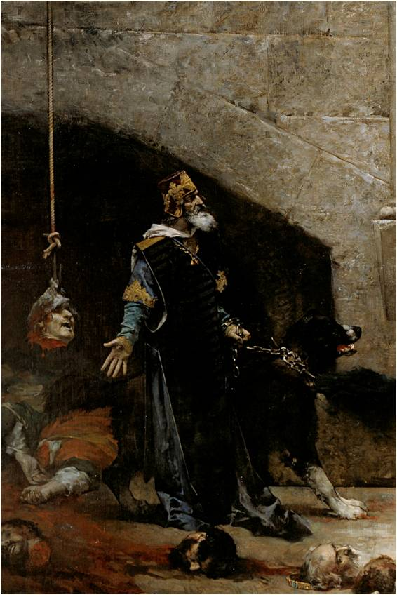 El rey Ramiro II de Aragón (1086-1157). Detalle del cuadro La campana de Huesca, de José Casado del Alisal.